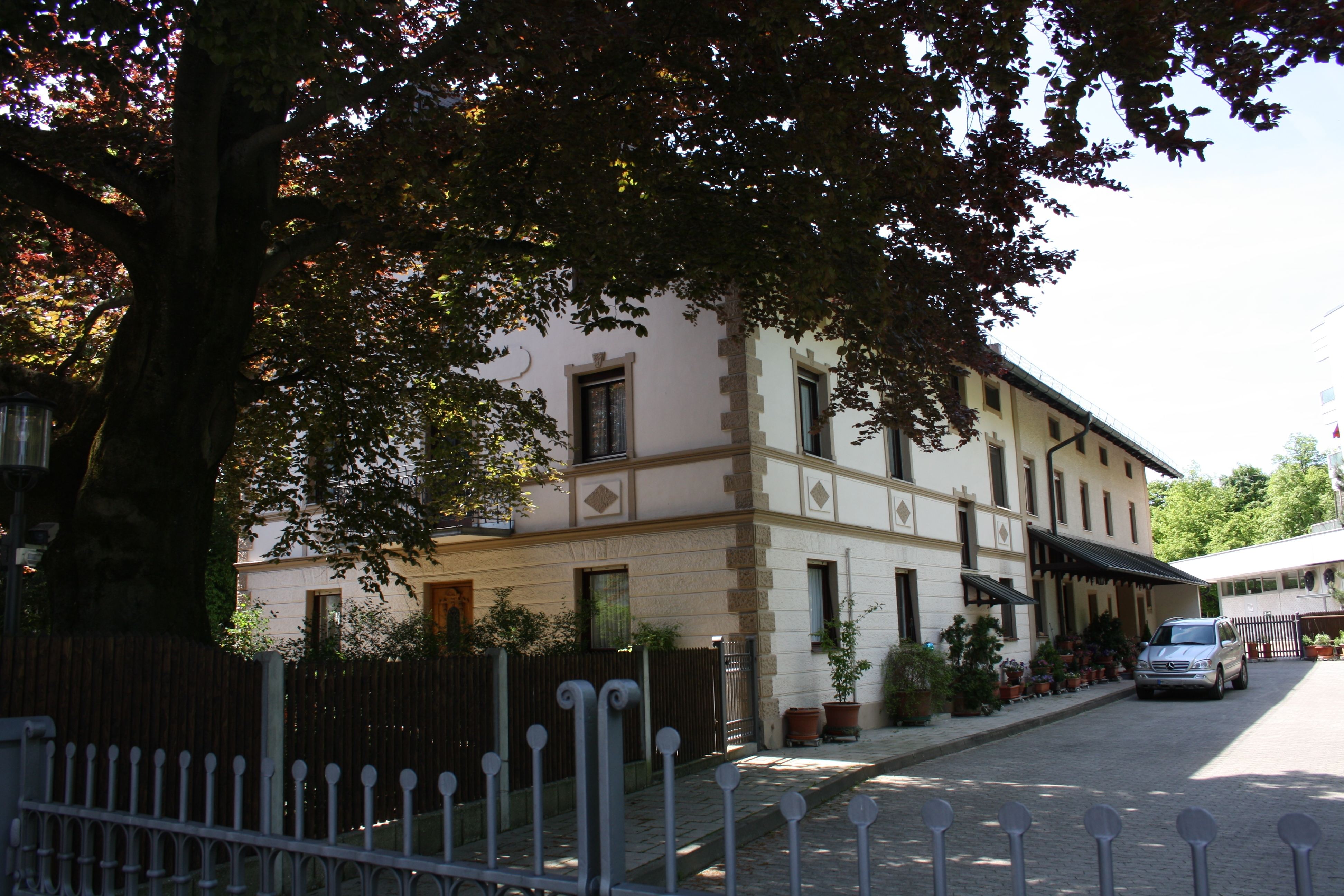 ehemaliges Wohngebäude der Ziegelei Rattenhuber in München-Englschalking